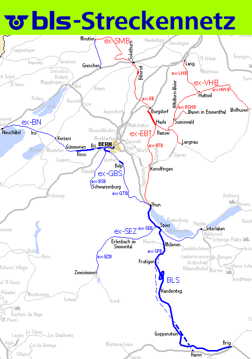 Karte der BLS AG. Blau = ehemalige BLS, rot = ehemaliger RM.